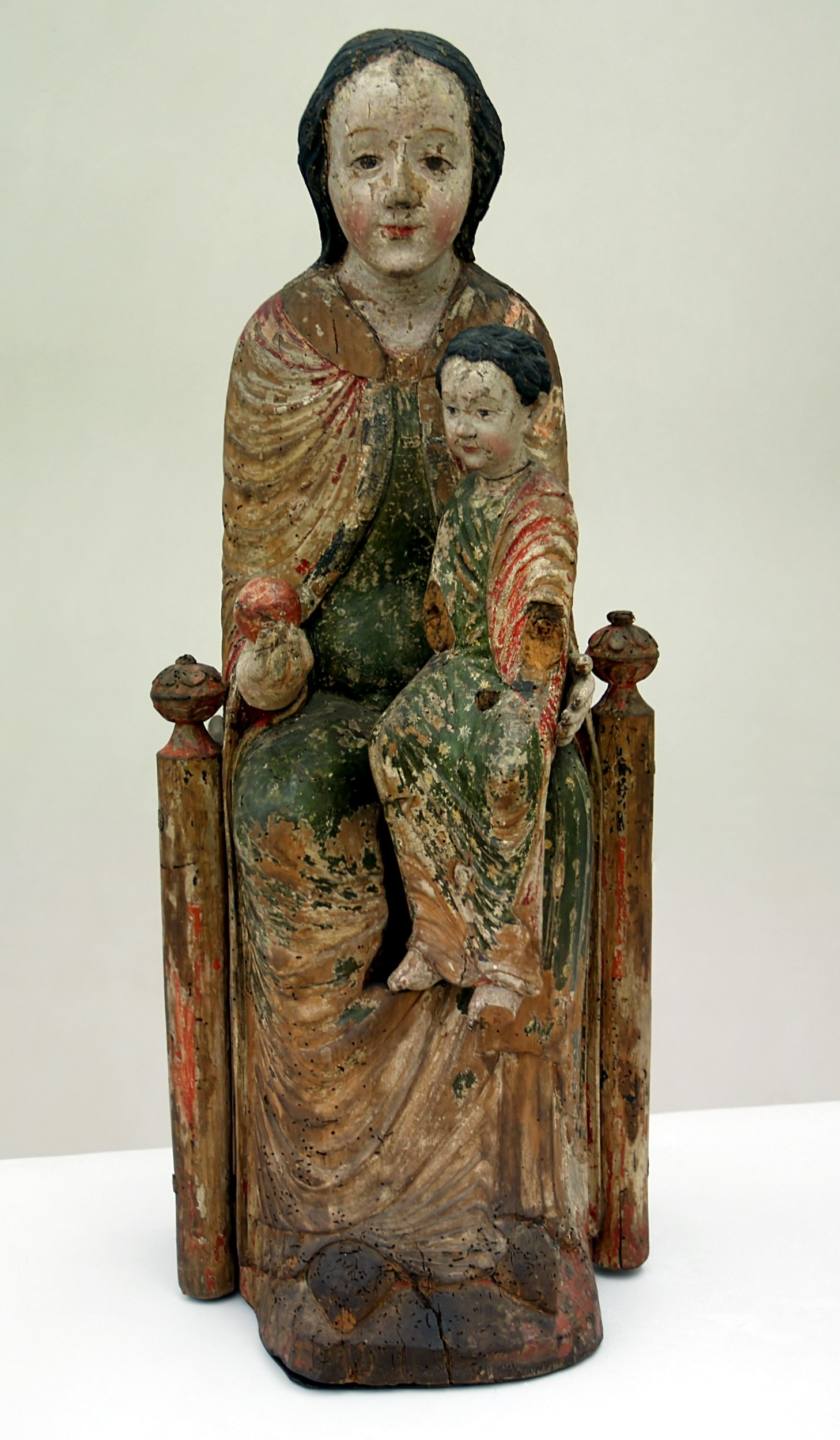 Pingsdorfer Muttergottes, Köln (?)